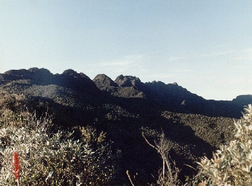 Farallones de Cali, Travesia